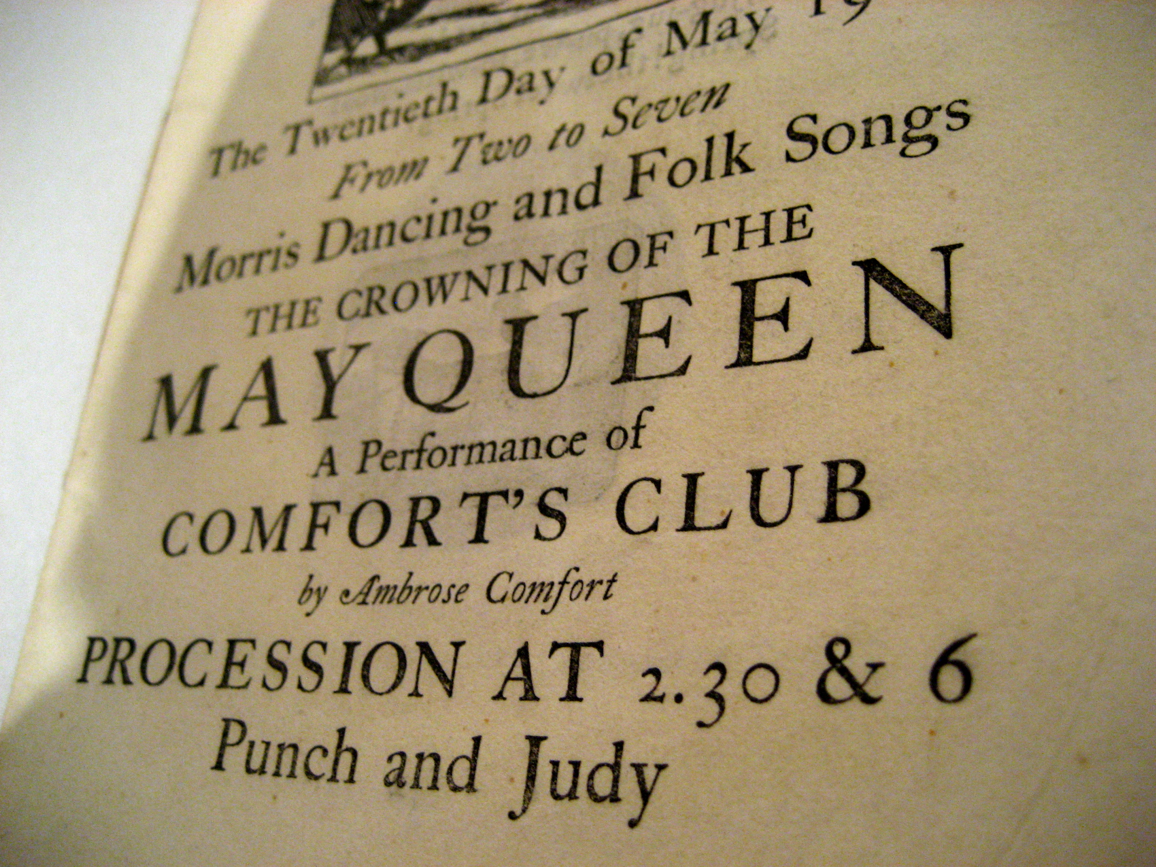 May Queen